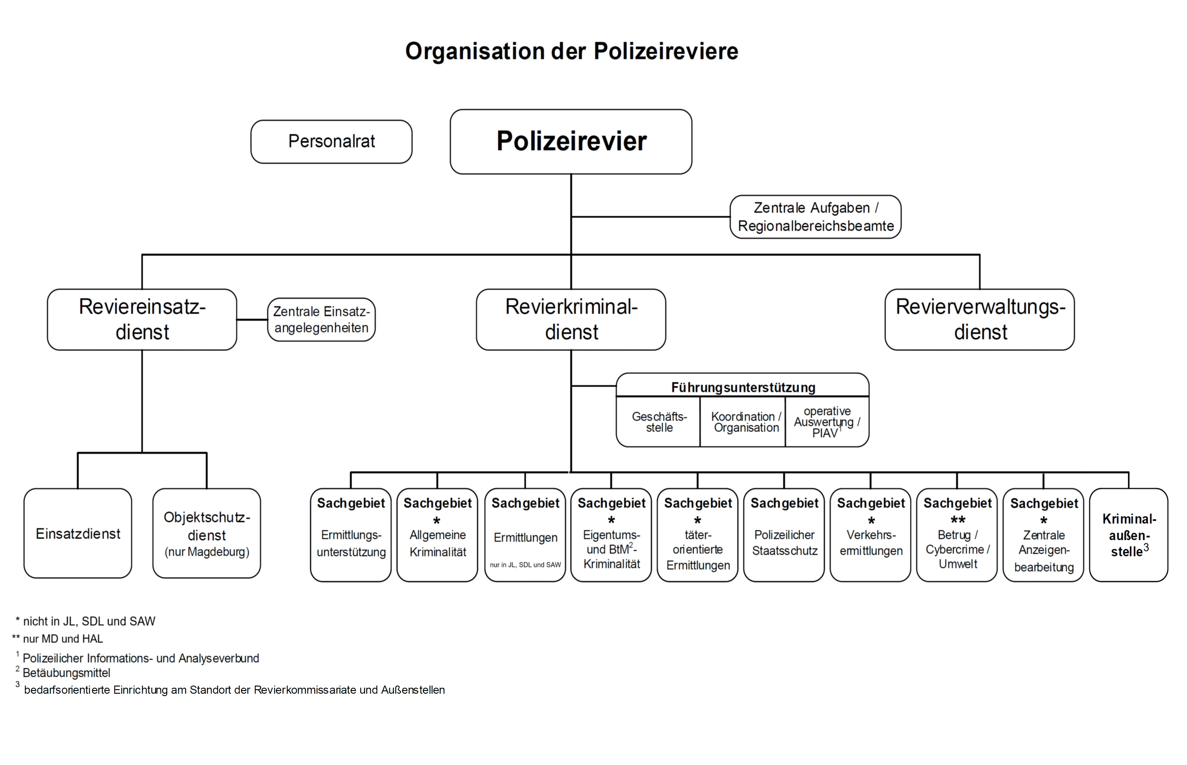 Struktur eine Polizeireviers in Sachsen-Anhalt